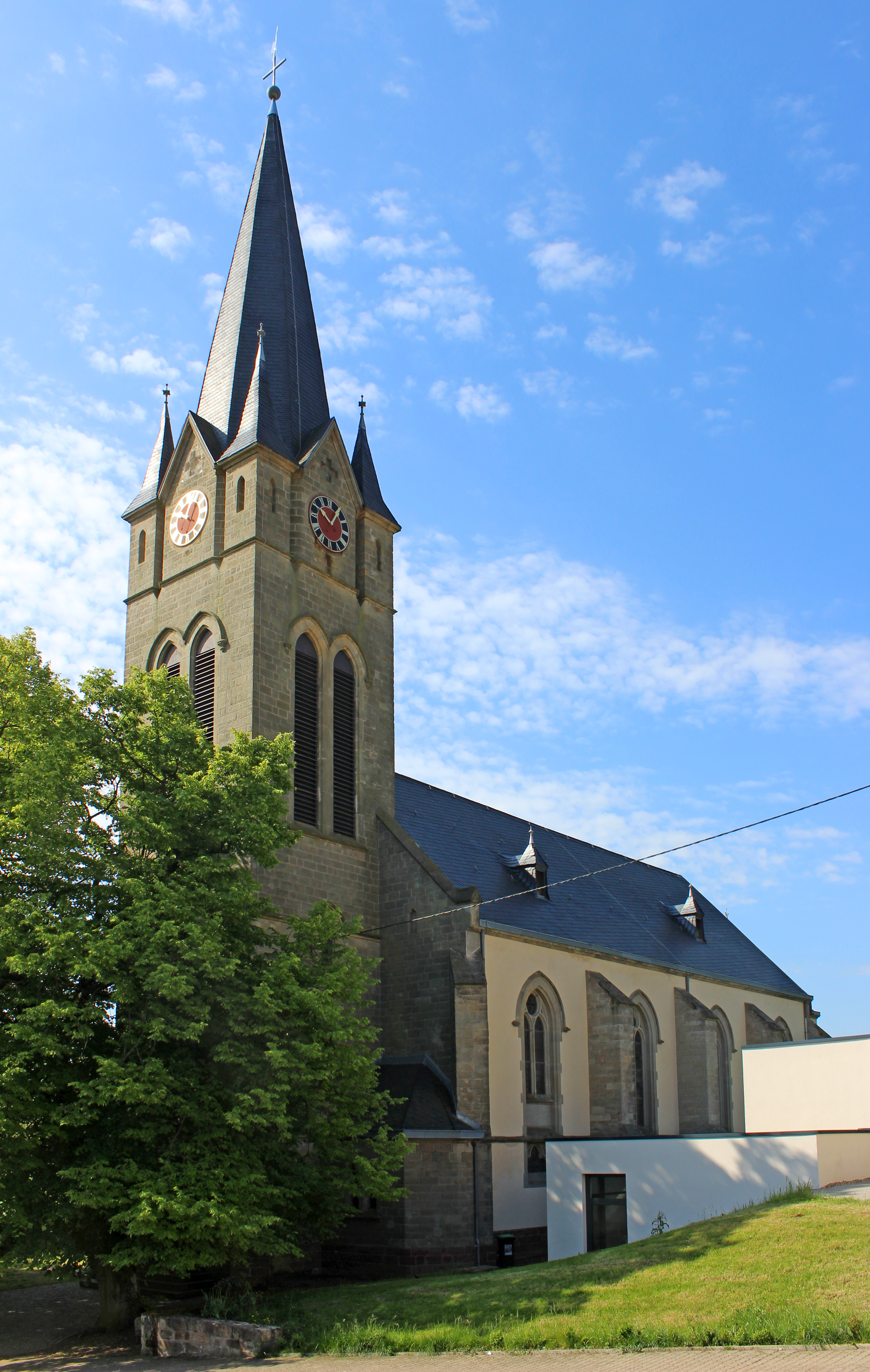 Die katholische Kirche St. Nikolaus in Felsberg, einem Ortsteil von Überherrn, Landkreis Saarlouis, Saarland